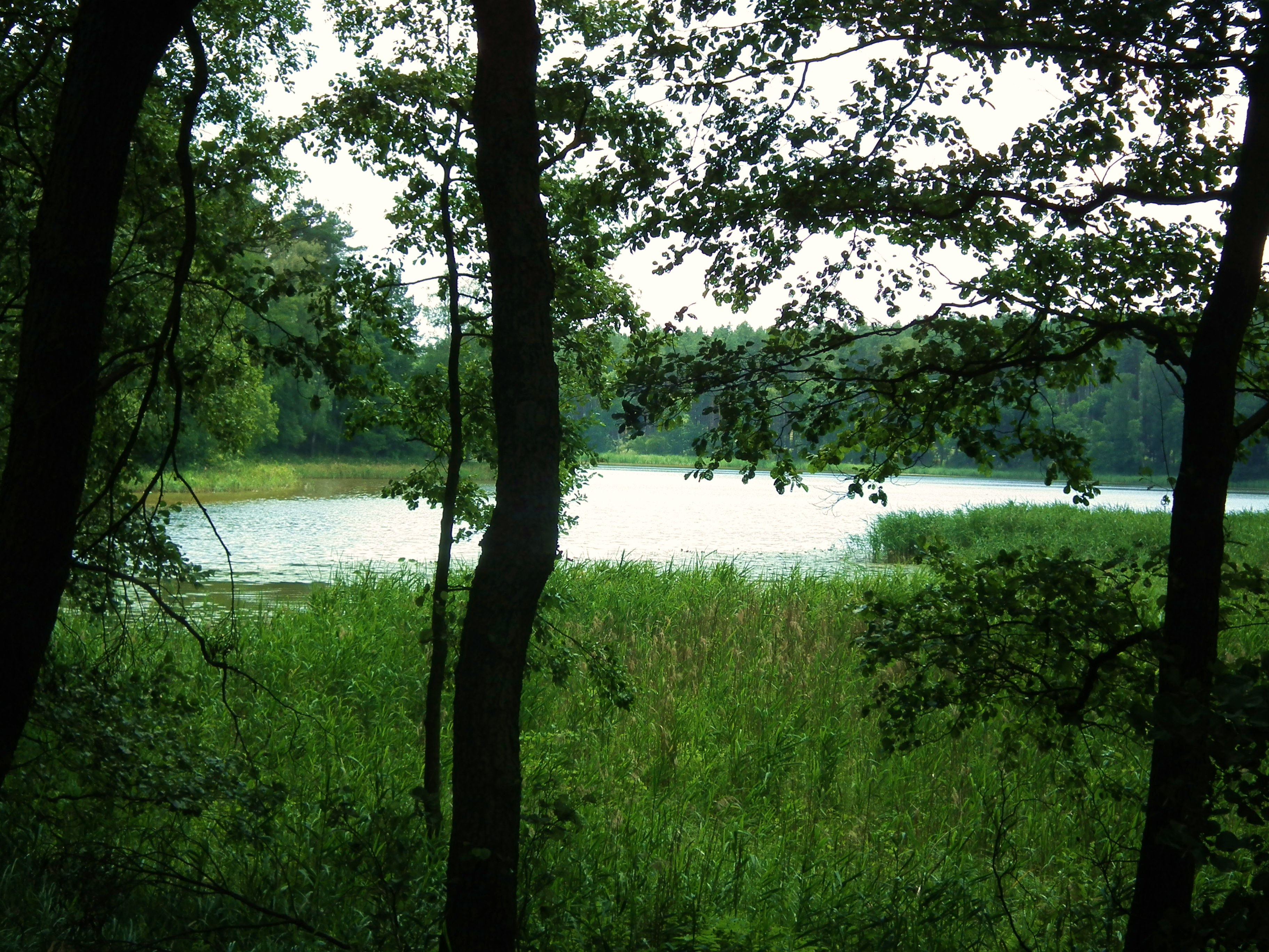 Jez. Kłosowskie koło Sierakowa.